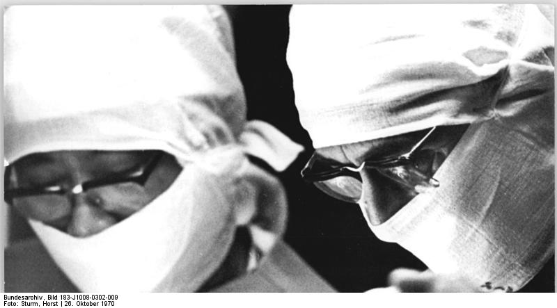 Leipzig, Universitätsklinik, Herzoperation Zentralbild Deutsche Demokratische Republik 26.10.1970 "Bitte Ruhe - Herzoperation" Fachliches Wissen, Präzision und Konzentration - drei unerläßliche Eigenschaften für eine Herzoperation. Prof. Ton That Tung (links), Prof. Martin Herbst. Reporter: Sturm (Bitte beachten Sie unseren Begleittext)